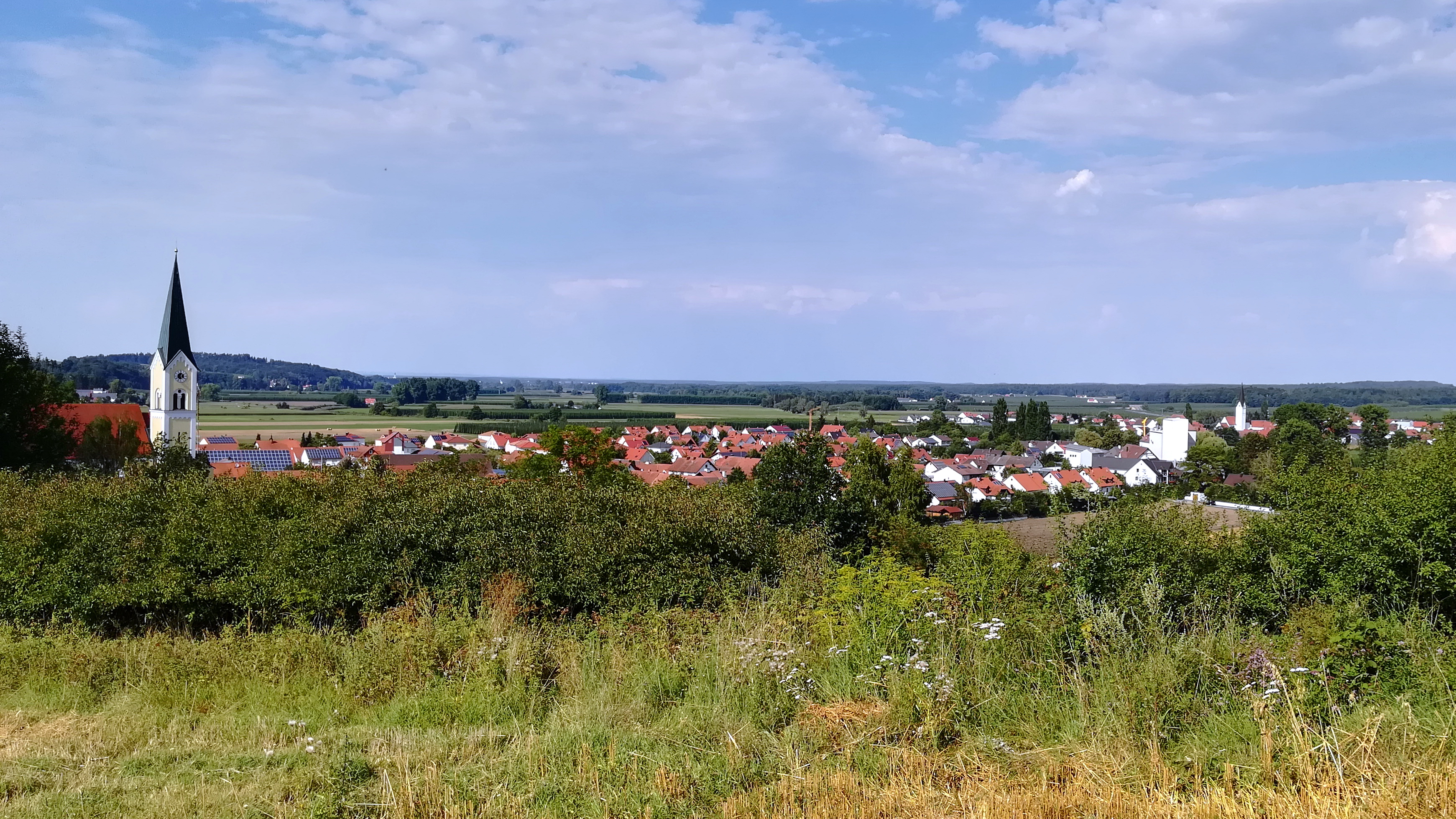 Fahlenbach ist eine ehemalige Gemeinde in der Hallertau und ein Ortsteil der Gemeinde Rohrbach im oberbayerischen Landkreis Pfaffenhofen an der Ilm.